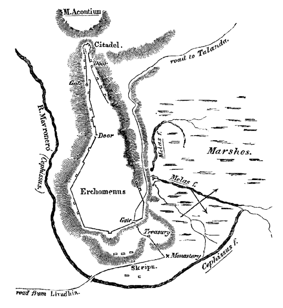 Kaarte van Orchomenus uit Travels In Northern Greece II van William Martin Leake (1777-1860) - overgenomen van - hij is langer dan 70 jaar dood dus geen copyright